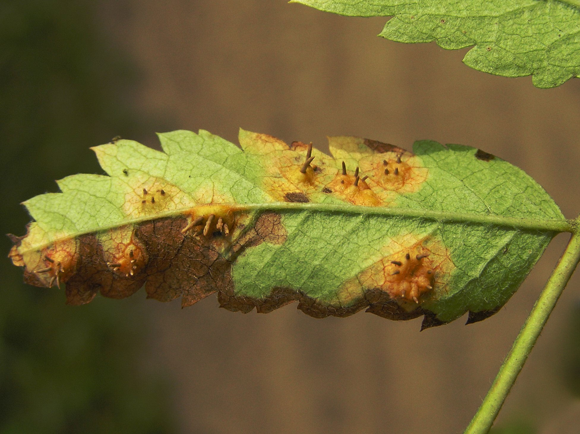 Gymnosporangium tremelloides, Brok, Polska